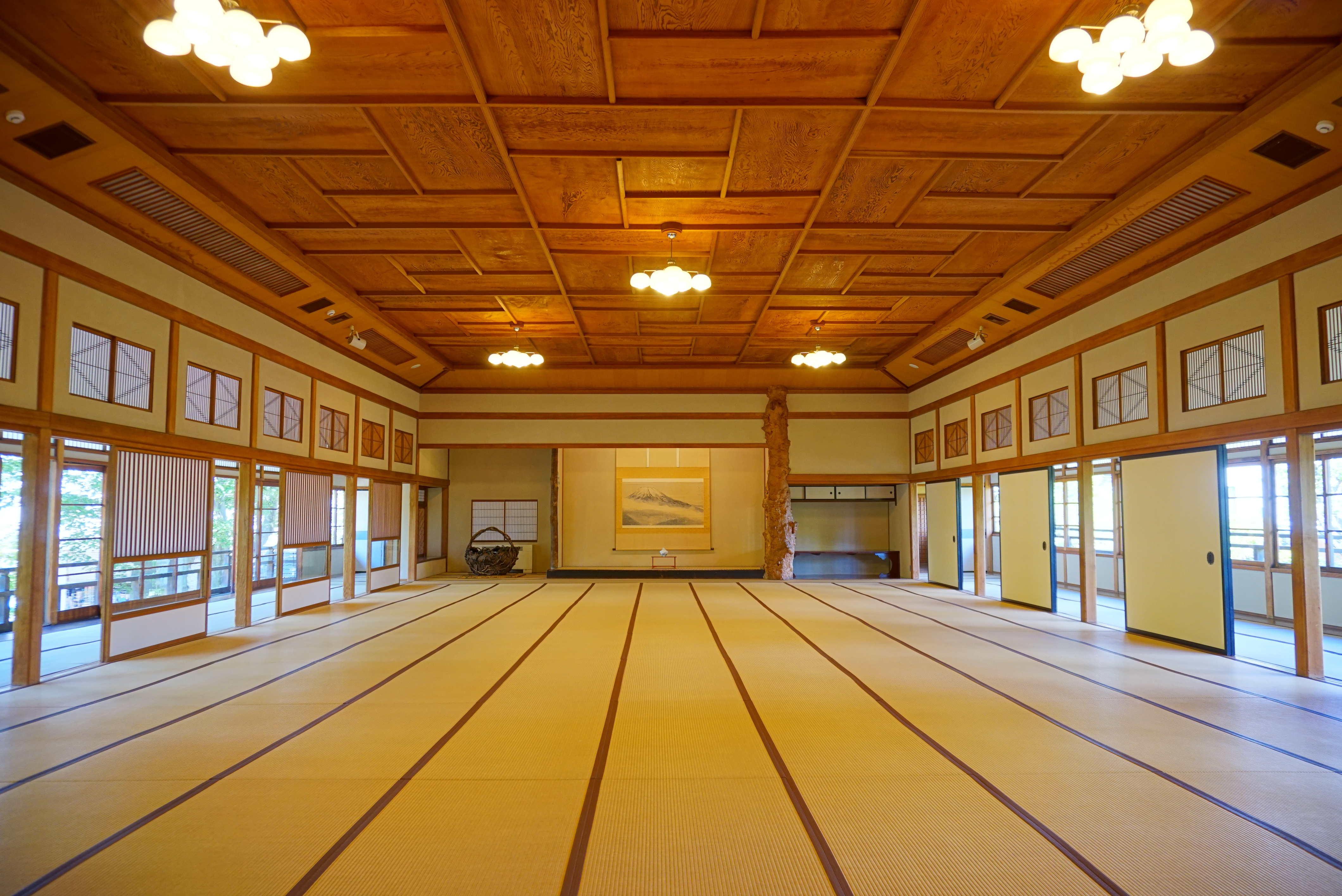 能代市観光交流施設、旧料亭金勇。秋田杉の天然材をふんだんに用いたかつての料亭で、2009年に料亭としては廃業し、施設が市に寄贈された。その後2013年に市の観光交流施設として再オープンしている。国の登録有形文化財に登録された豪奢な建物は、「東洋の木都」と称された工業都市、能代の往時の繁栄を伝える。